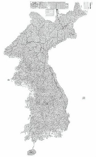 문화재의 저작권에 대해서는 를 참조하시오.